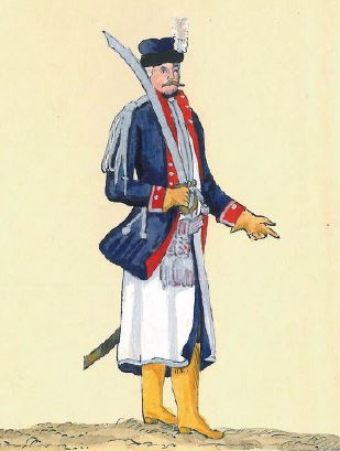 Brygadier Dzielonki komendant 2 Brygady Kawalerii Narodowej (Oficer 2 Brygady Kawalerii Narodowej Zielonki